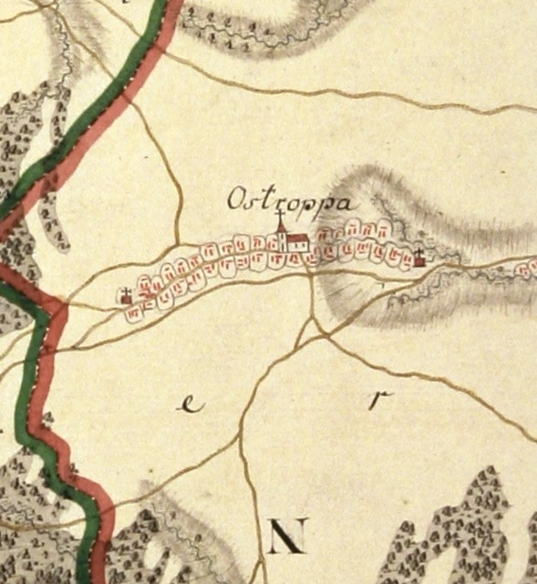 Ostropa - dzisiejsza dzielnica Gliwic.